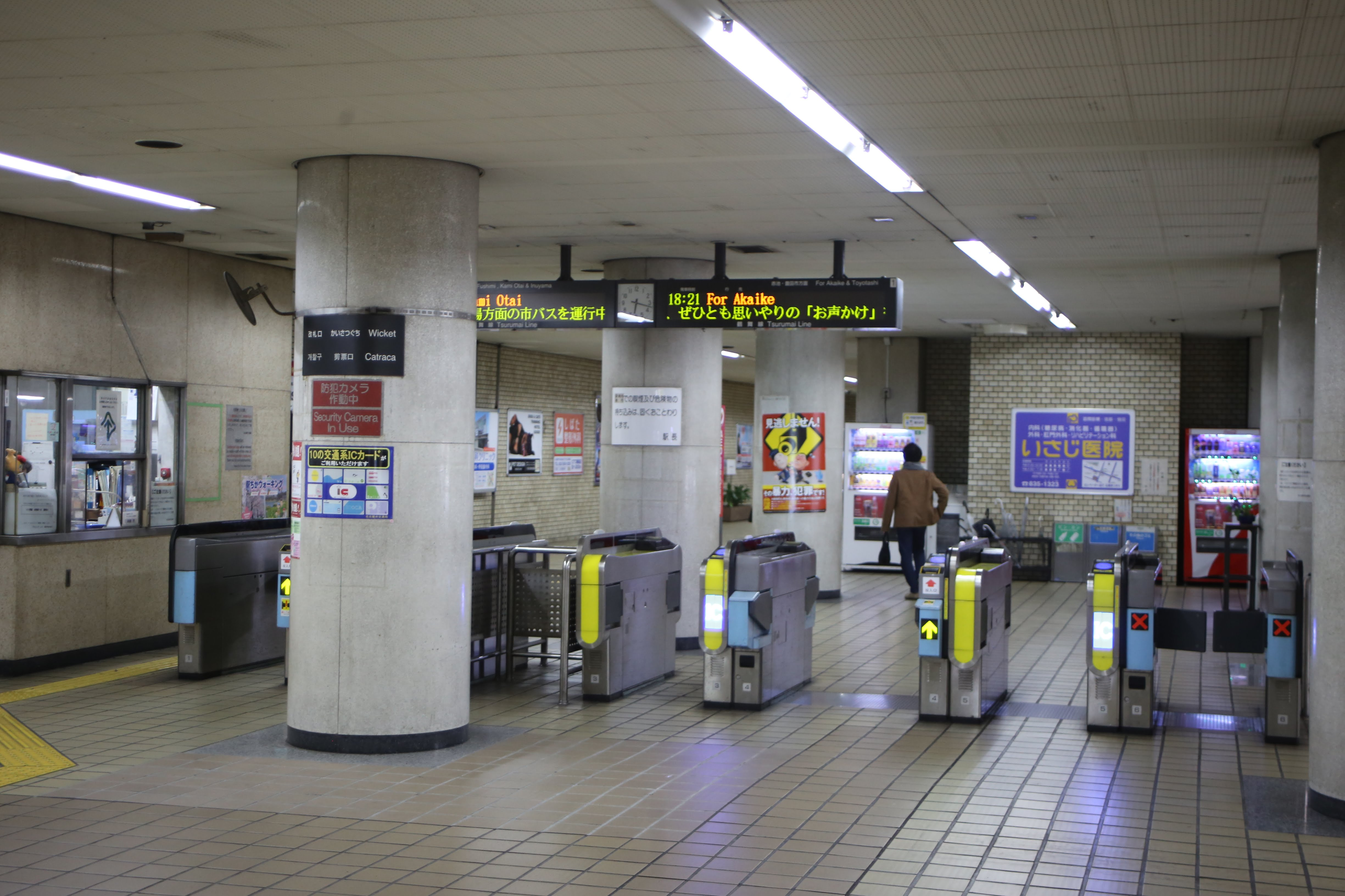 名古屋市営地下鉄鶴舞線塩釜口駅